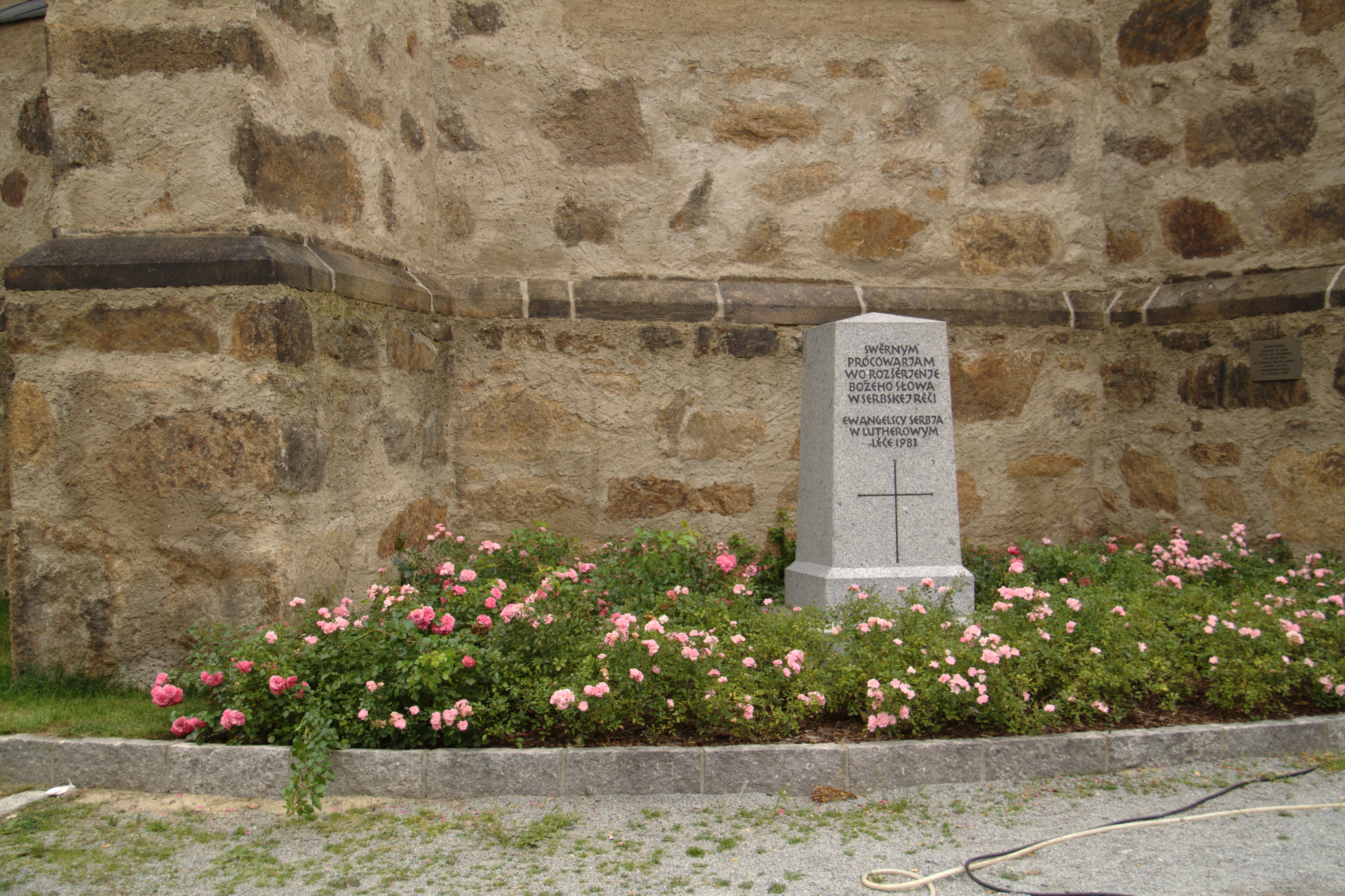 Bautzen; Sorbisches Denkmal aus Granit an der Südost-Seite der Michaeliskirche Hornjoserbsce: Pomnik ewangelskim serbskim prócowarjam při Michałskej cyrkwi w Budyšinje.